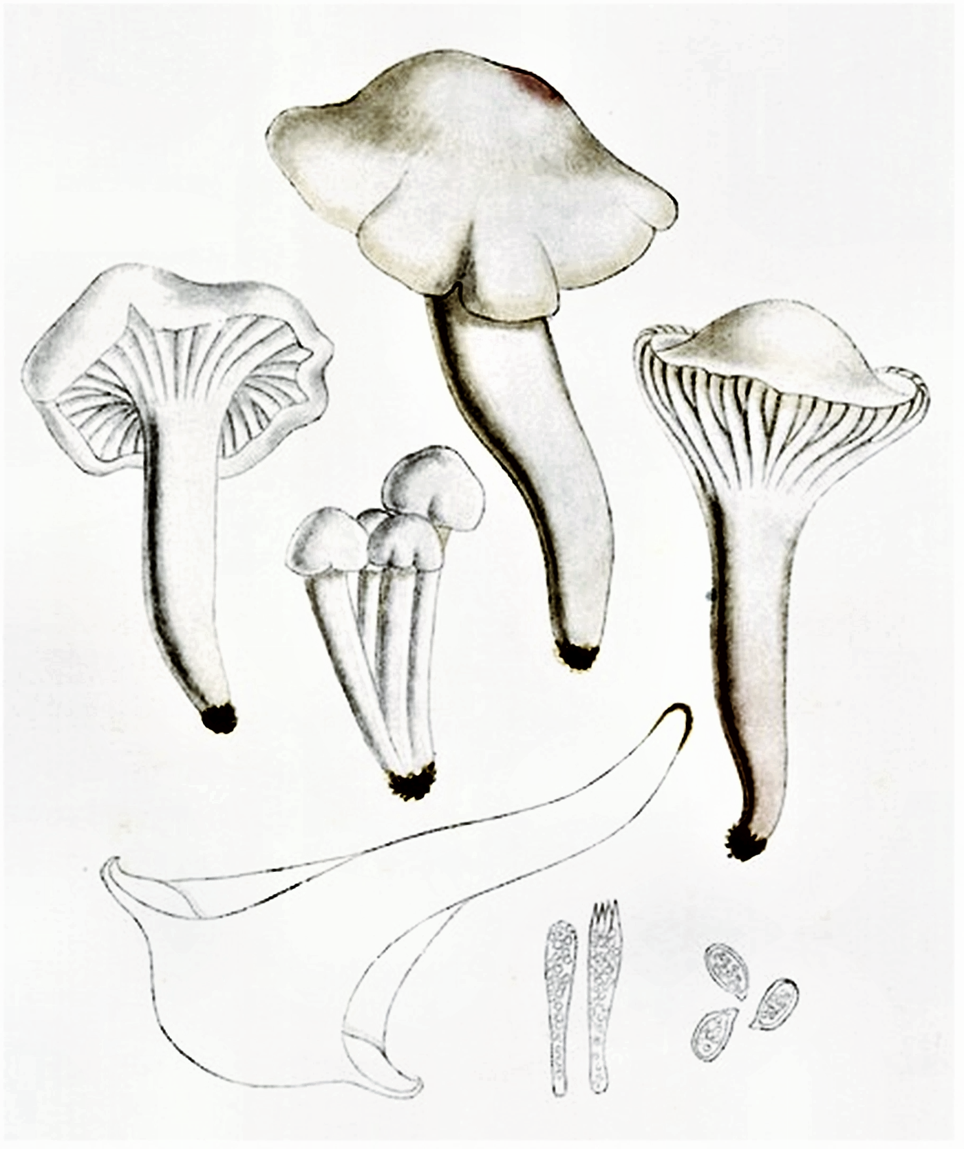 Giacomo Bresadola: 1. Hygrophorus virgineus (Wulfen, 1781 ex Fr. (1838), heute Hygrocybe virginea (Wulfen) P.D.Orton & Watling (1969)) oder Cuphophyllus virgineus (Wulfen) Kovalenko (1989)